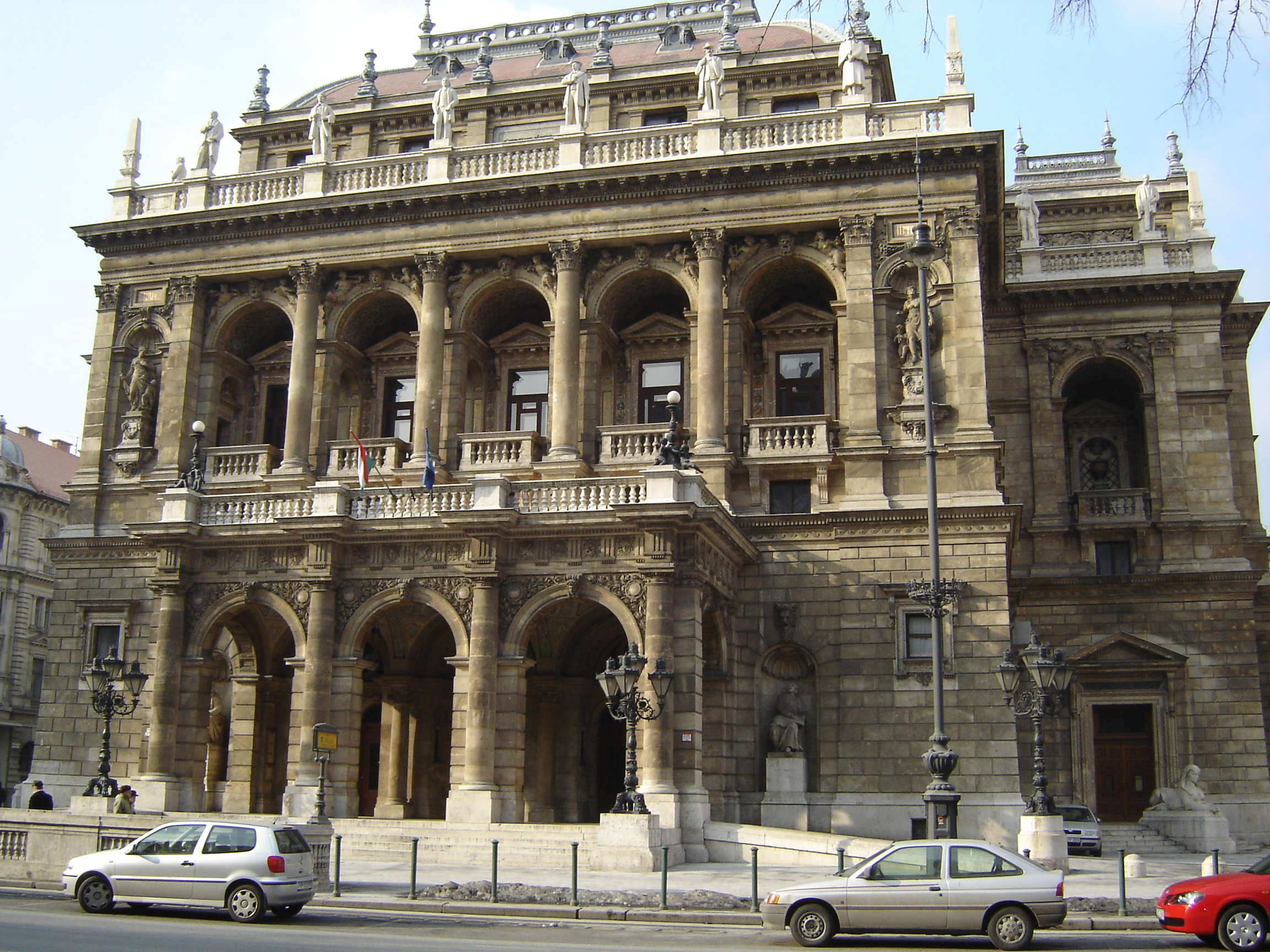 A budapesti operaház főhomlokzata